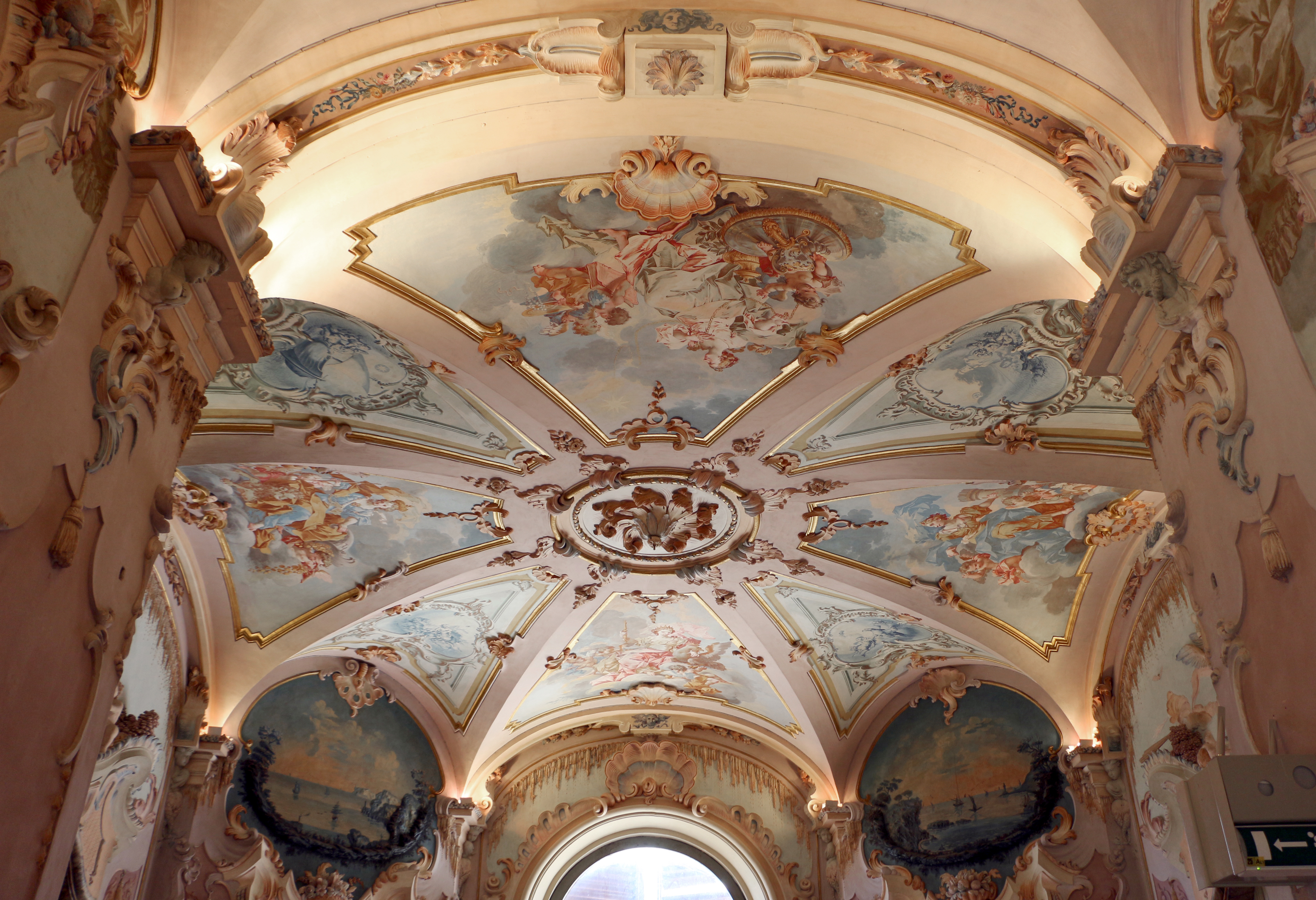 Pinacoteca Civica, Palazzo Pianetti This is a photo of a monument which is part of cultural heritage of Italy.